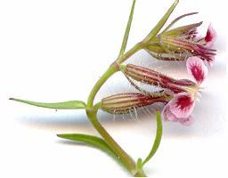 Silene_gallica_fleur